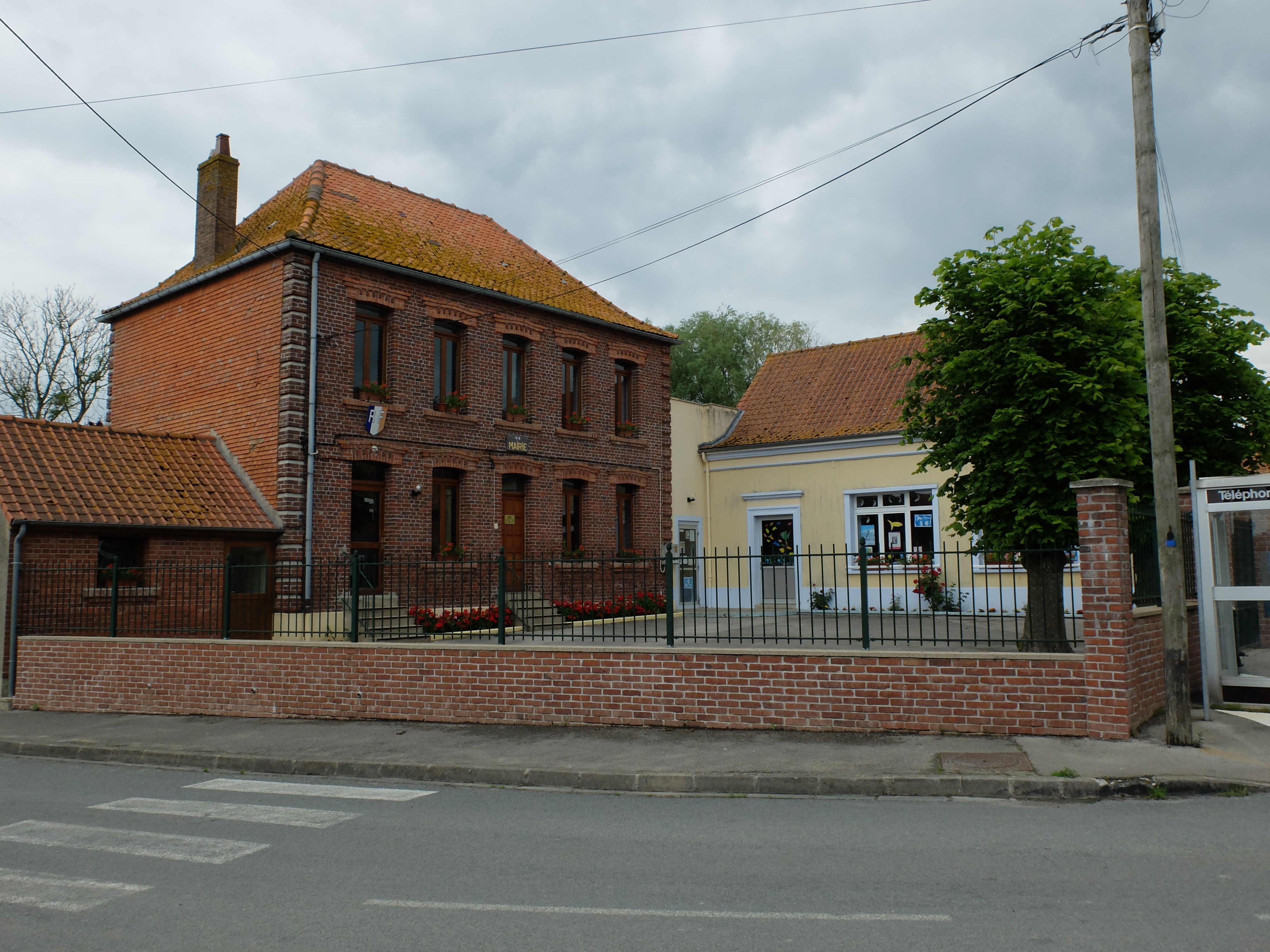 Vue de la mairie de Quesques.